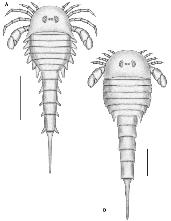 Strobilopterus proteus juvenile instars. Reconstructions of juvenile instars. A: Possible larval instar α. Distal morphology of the paddle is extrapolated from a juvenile individual of Strobilopterus princetonii. The telson is reconstructed from FMNH PE 61166. B: Juvenile instar β. Details of distal paddle morphology are extrapolated from a juvenile individual of Strobilopterus princetonii. The telson is extrapolated from FMNH PE 61166. Scale bars = 10 mm.